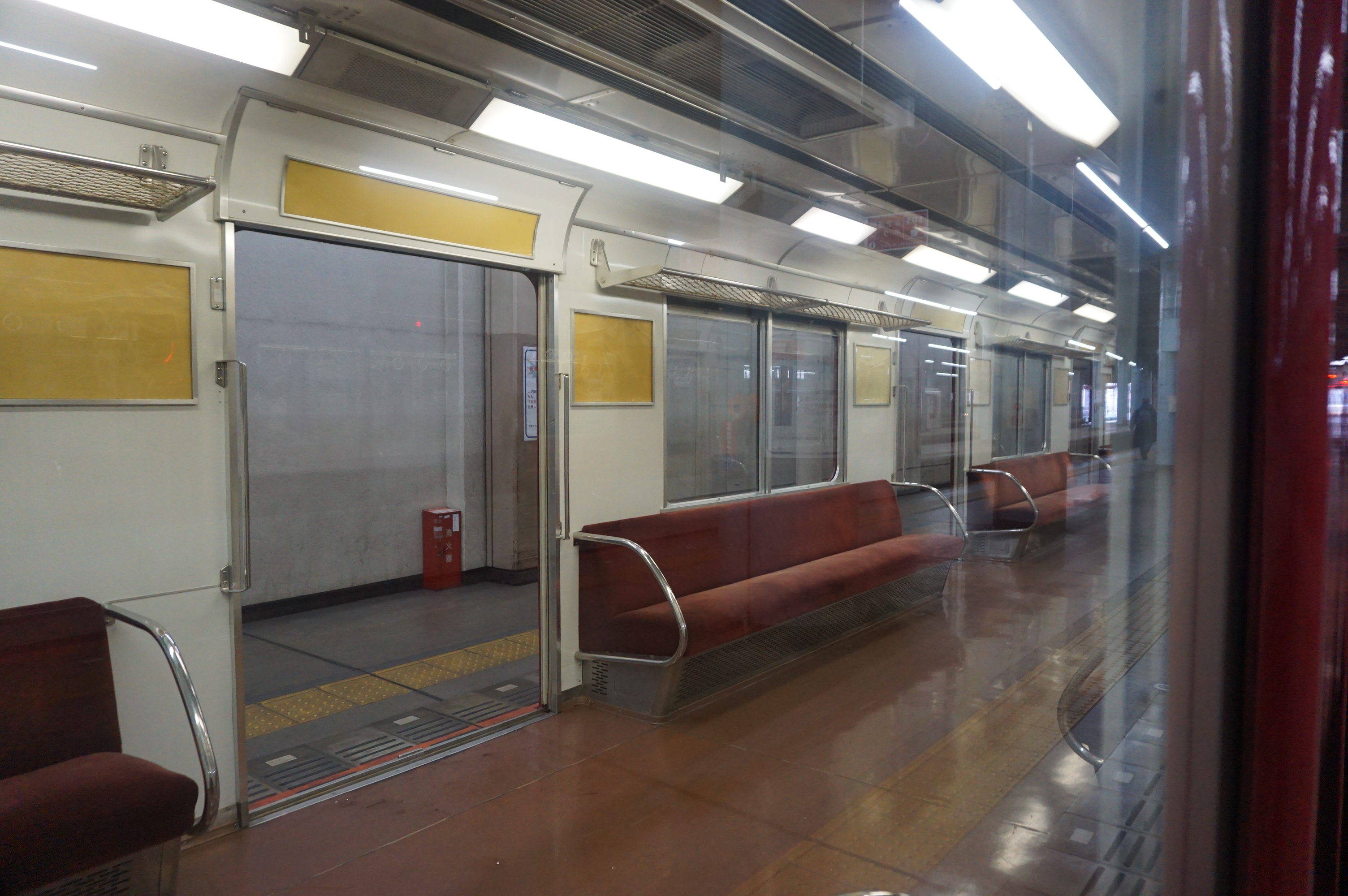 つり革のない車内